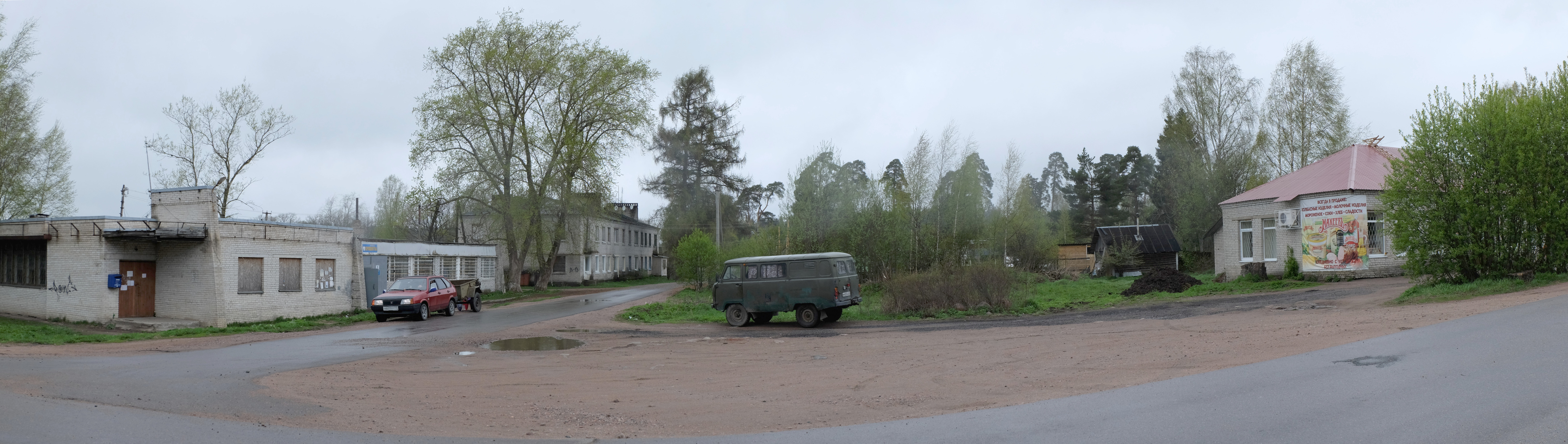 Tervajoen eli Bolšoje Polen (ven. Большое Поле) keskustaa. Tervajoki on maaseututaajama Tienhaaran (ven. Селезнёво, Seleznjovo) kunnassa Leningradin alueen Viipurin piiriissä Venäjällä.